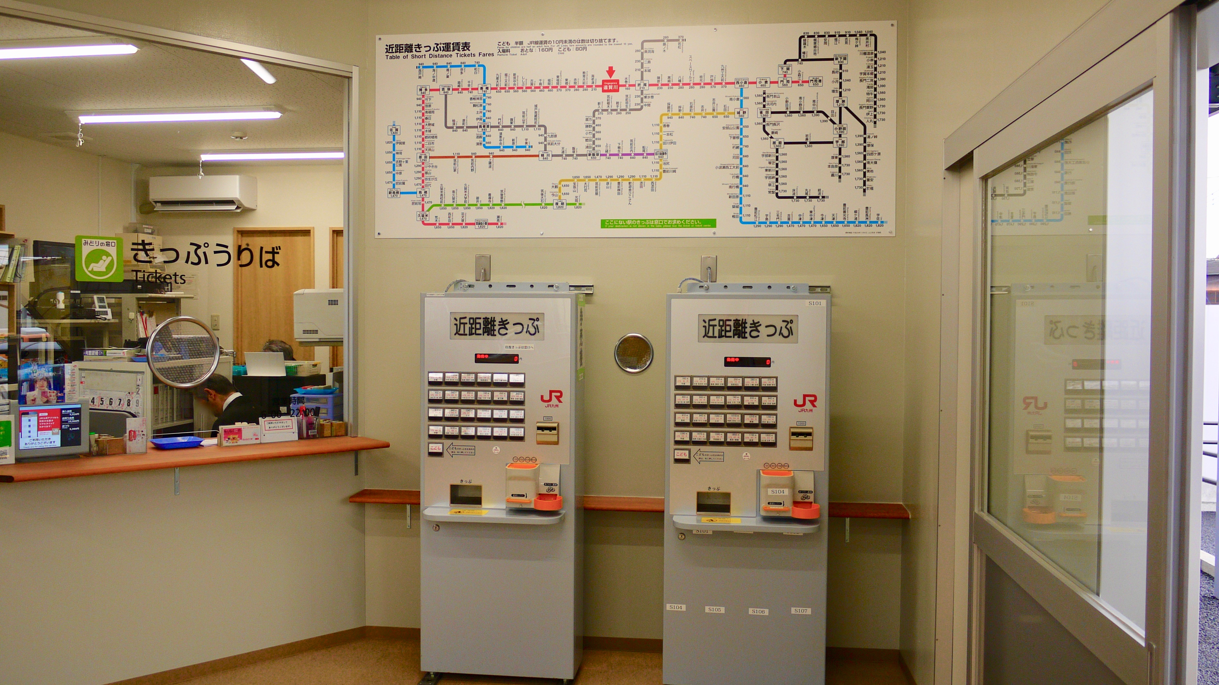 遠賀川駅の新駅舎に設置された新たな券売機